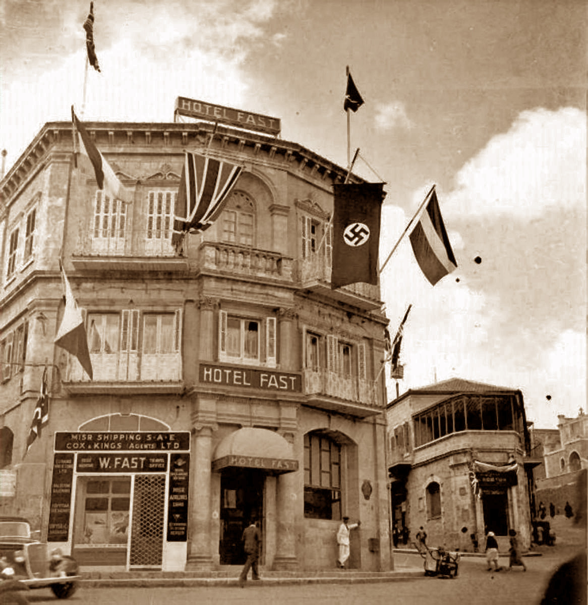 עיבוד לצילום של מלון פאסט נושא דגל צלב קרס ב-1933, ירושלים